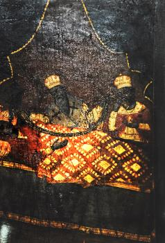 Μητάκος Χατζησταμάτης (αποδίδεται), Η θεραπεία της αυτοκράτειρας Ζωής, 1892, Άγιος Αθανάσιος Θεσσαλονίκης